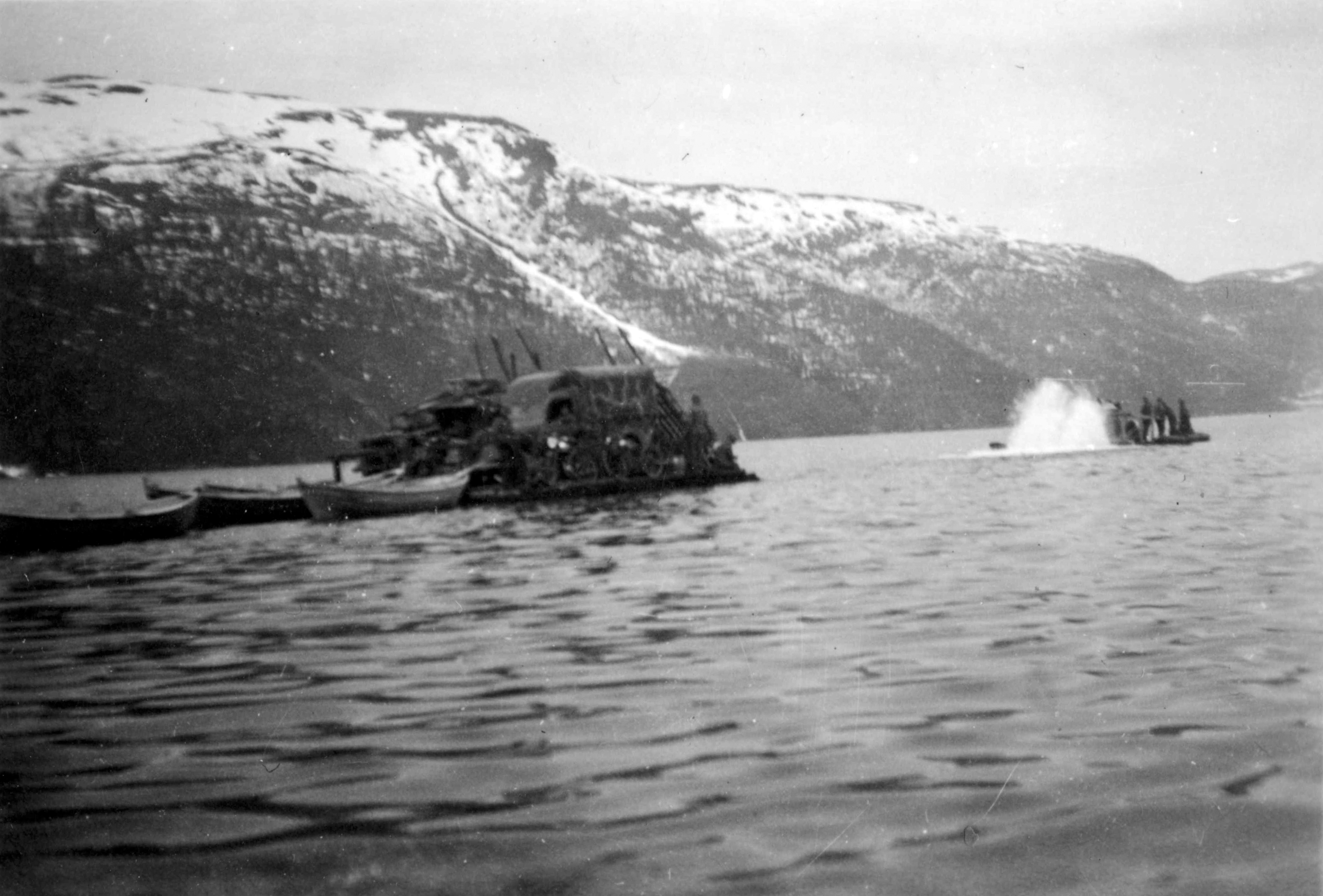 Tittel / Title: Elsfjorden Dato / Date: Mai 1940, biler og busser på flåten. Bilmotor er koblet til og gjør nytte som trekkraft (det skummer). Fotograf / Photographer: Karl Marth Sted / Place: Elsfjorden, Nordland, Norge Eier / Owner Institution: Arkiv i Nordland Lenke / Link: Arkiv i Nordland Arkivreferanse /Archive reference: AIN.NA143.0198 Fra Dag Skogheims Privatarkiv Da tyskerne kom til Elsfjord var der ikke båter de kunne bruke. Tyskerne laget en improvisert ferge, de snekret sammen en flåte, tok ut motoren i en av bilene sine, satte den på en mindre flåte, laget en slags propell, festet slepetau i den større flåten og lot det stå til ut fjorden. When the Germans came to Elsfjord there was not boats they could use. The soldiers made an impromptu ferry, they put together a fleet, took out the motor in one of their cars, put it on a smaller fleet, created a kind of propeller, attached tow rope in the larger fleet and left it to the fjord.